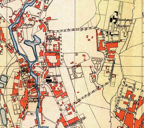 Kart over Torshov, 1887